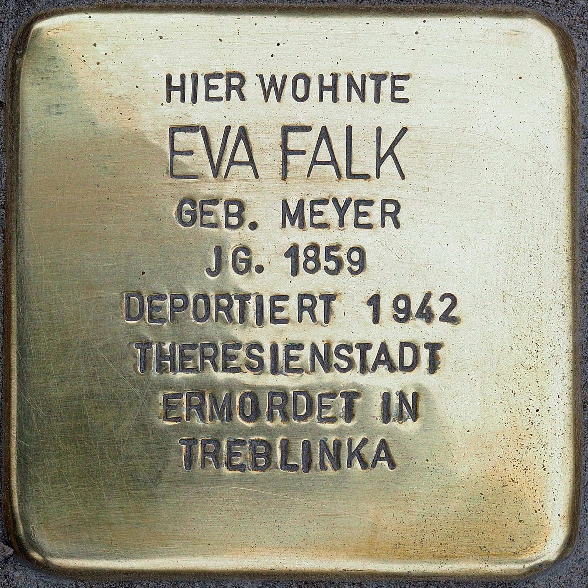 Stolpersteine in Kempen: Falk, Eva